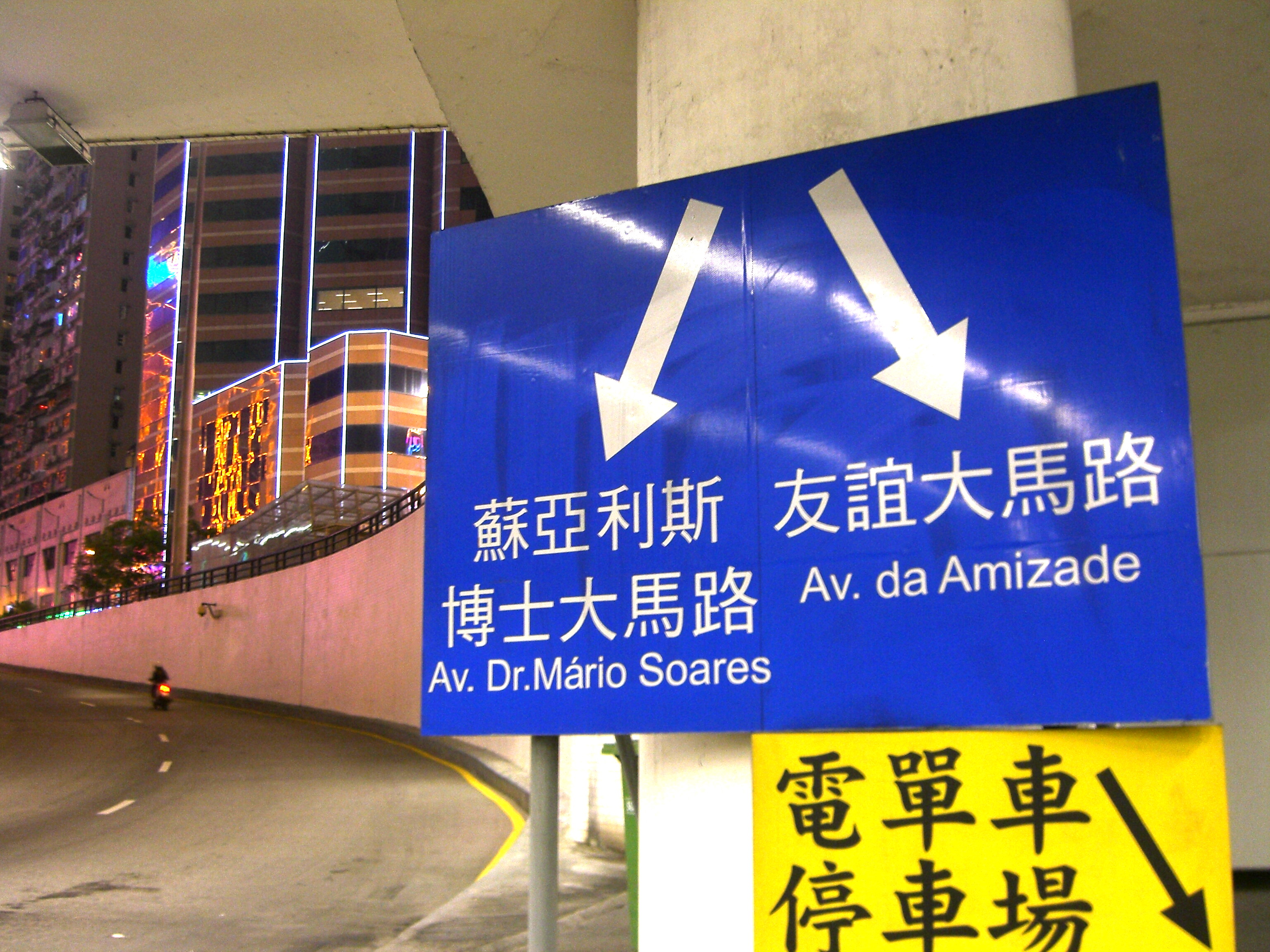 Avenida Doutor Mário Soares e Avenida da Amizade